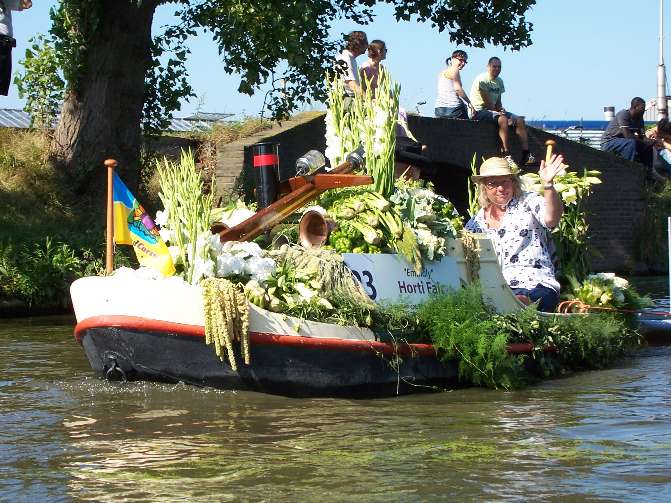 Self made picture